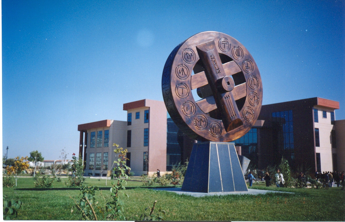 Məzahir Avşar Türkün Təkəri